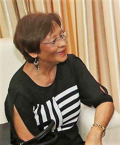 Pascoela Barreto, Botschafterin Osttimors in Vietnam